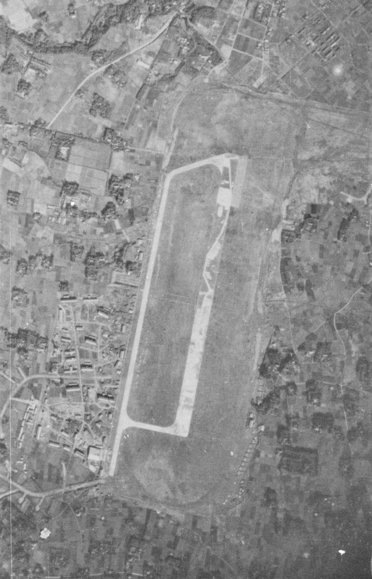 The copyright holder of this file, the Ministry of Land, Infrastructure, Transport and Tourism of Japan, allows anyone to use it for any purpose, provided that the copyright holder is properly attributed. Redistribution, derivative work, commercial use, and all other use is permitted. Attribution: Copyright © National Land Image Information (Color Aerial Photographs), Ministry of Land, Infrastructure, Transport and Tourism This image is copyrighted by the Ministry of Land, Infrastructure, Transport and Tourism of Japan. For terms of use, see the stipulation to use of National Land Information (in Japanese) and message from MLIT (in Japanese and English). When you display this image on an article, include the following phrase in the description: "Made based on [ National Land Image Information (Color Aerial Photographs)], Ministry of Land, Infrastructure, Transport and Tourism".